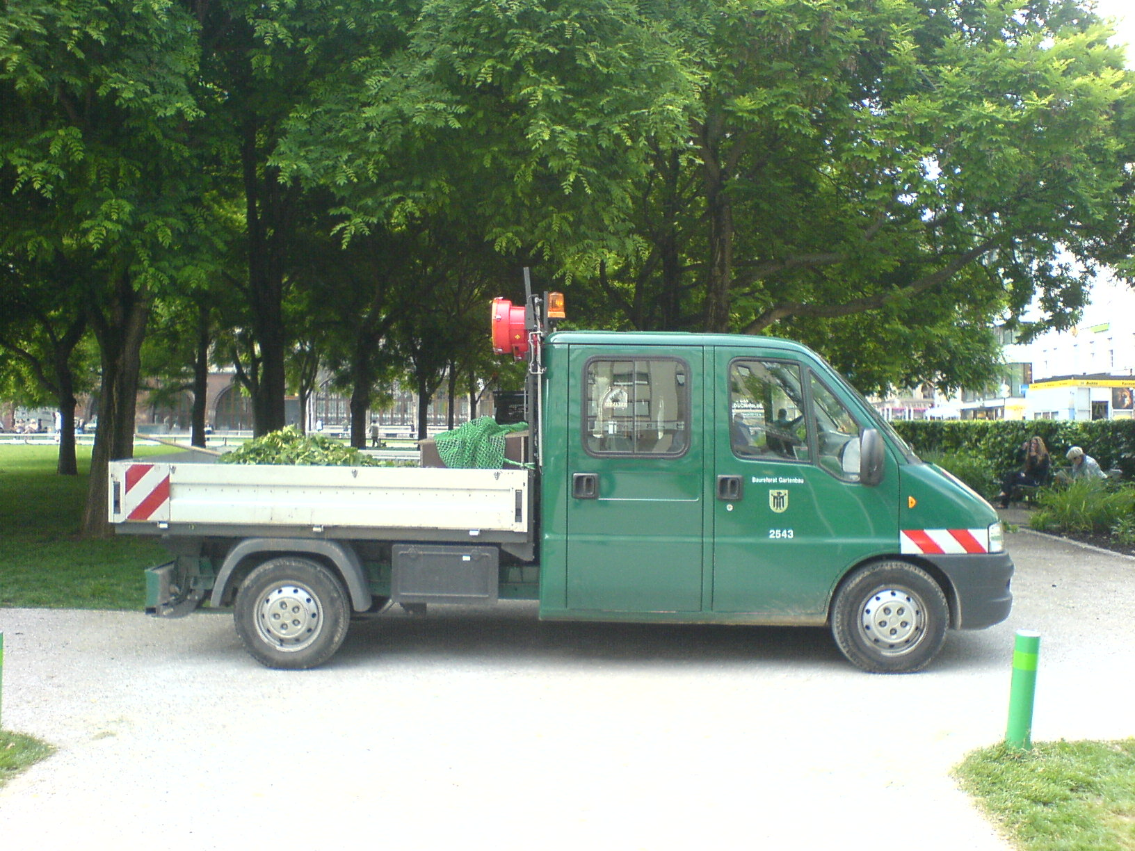 Pritschenwagen (Fiat Ducato) des Baureferates der Stadt München.